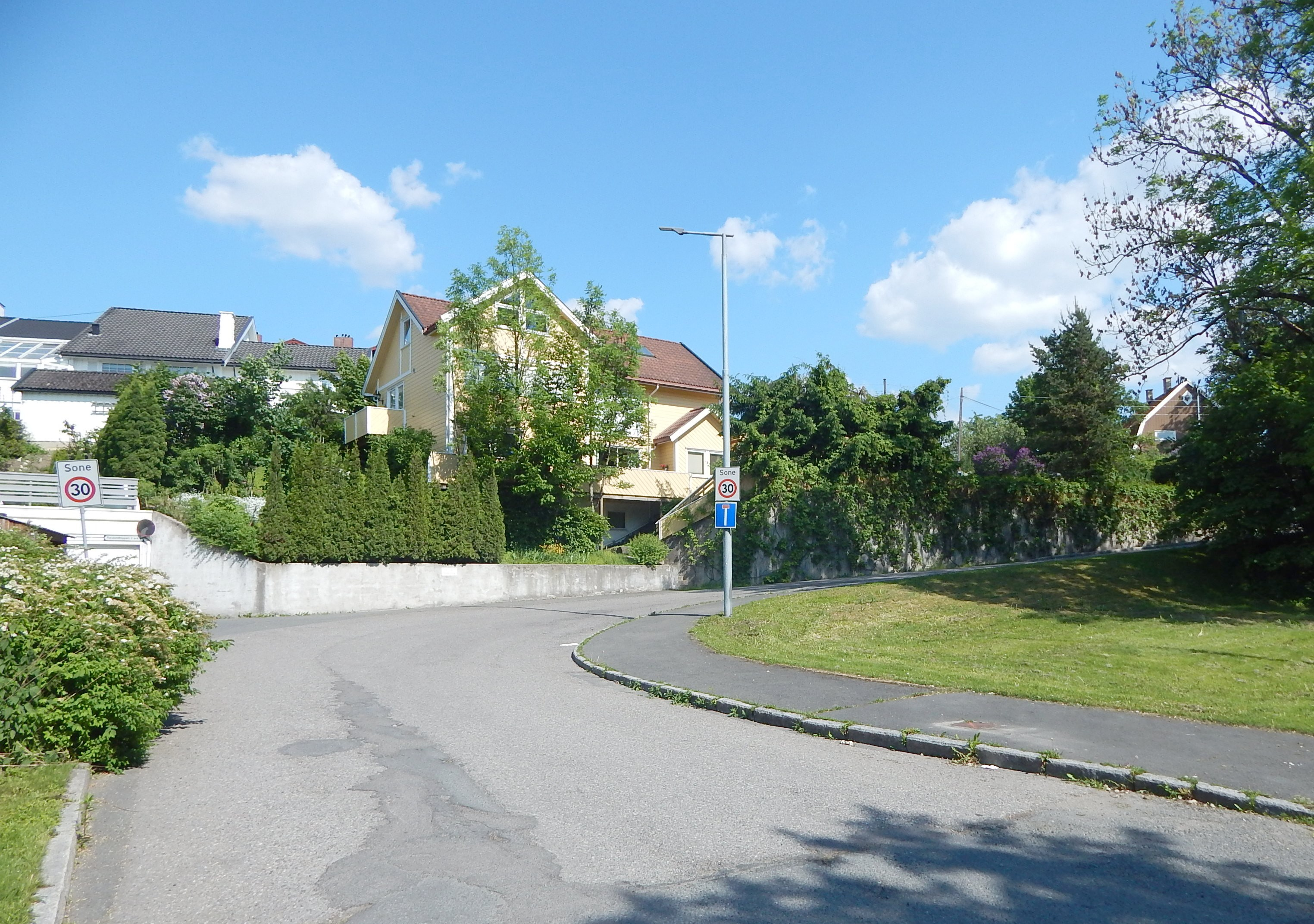 Furulundtoppen